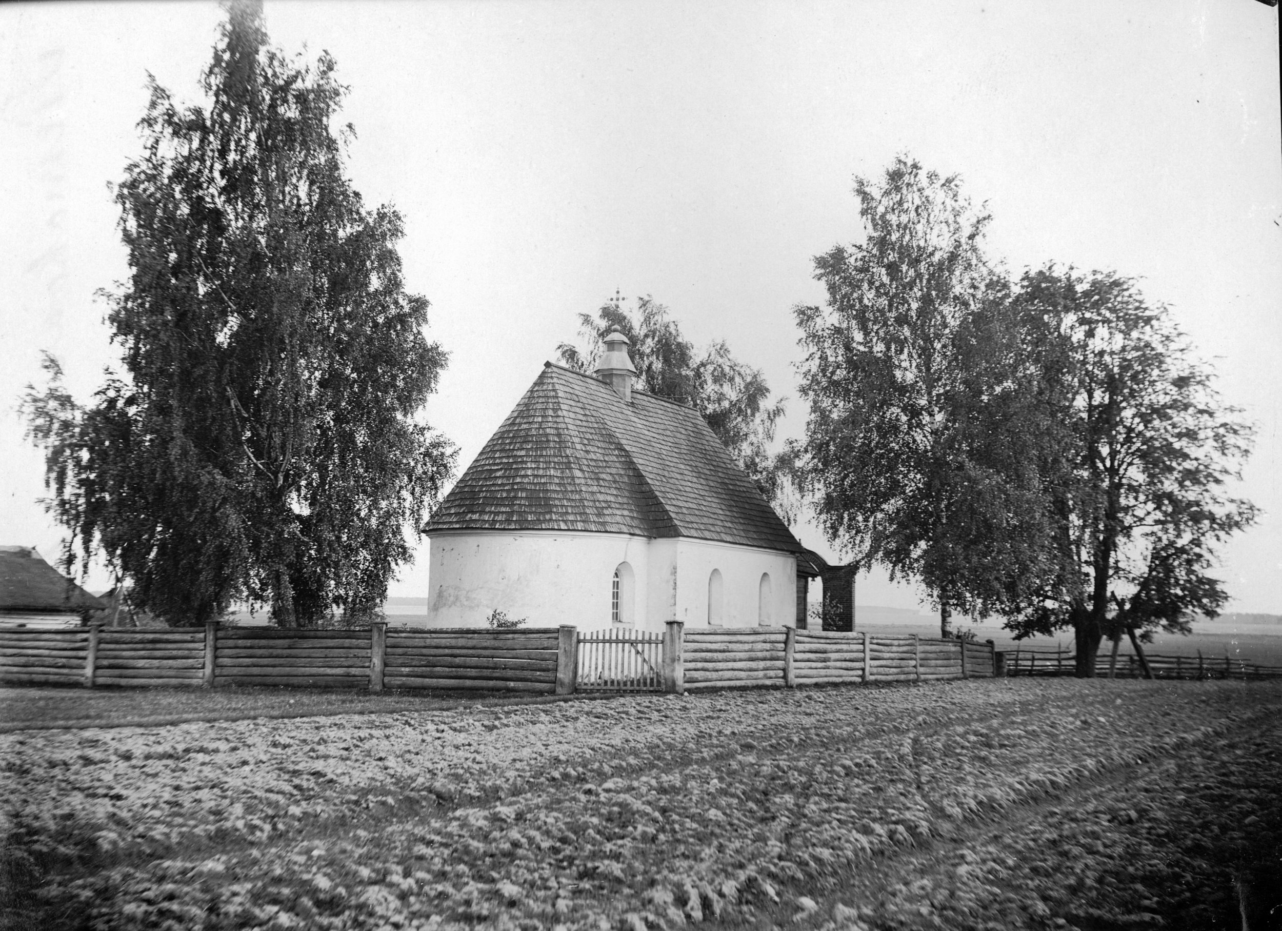 Беларуская (тарашкевіца): Сімакава (Simakava). Пакроўская царква